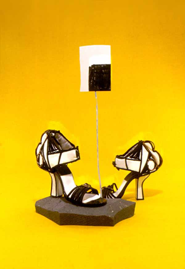 Schuhdesign H.R.